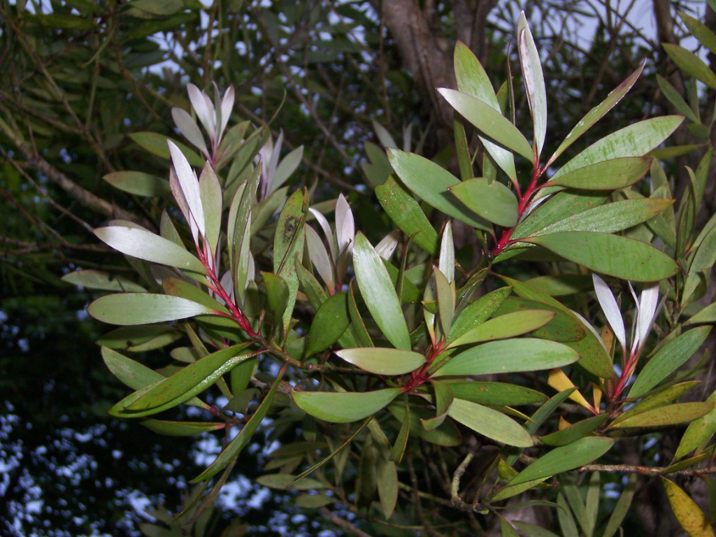 Melaleuca quinquenervia: leaves Photo : B.navez - 05 DEC 2005 - Réunion island